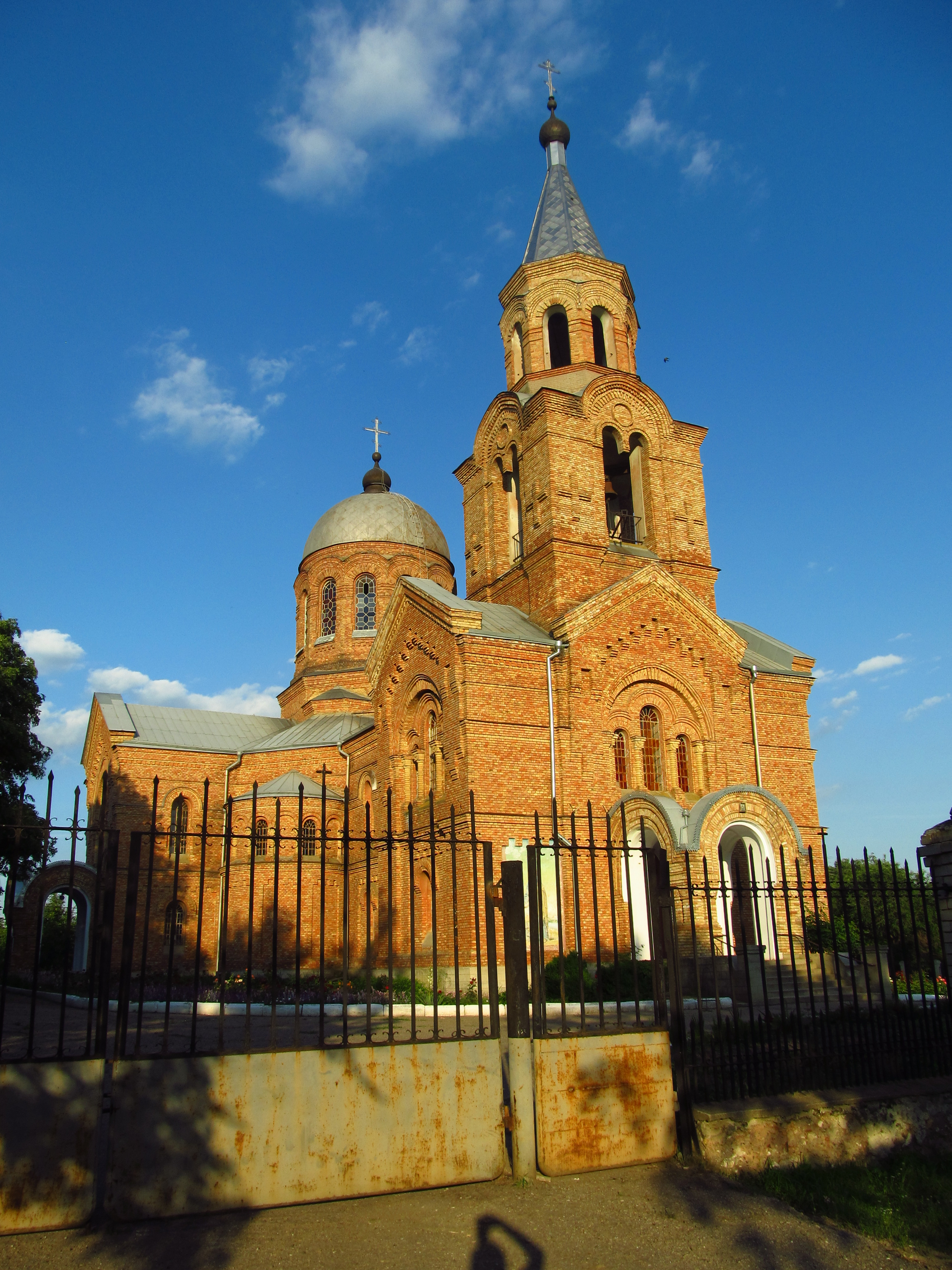 Свято-Покровська церква в с.Старокозаче, збудована у 1904р